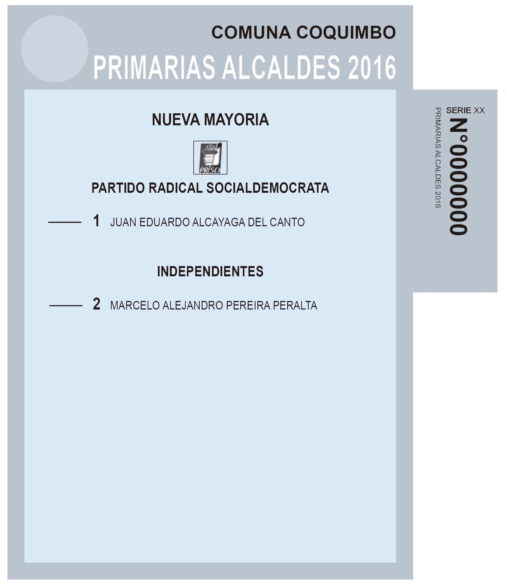 Facsímil de la cédula de votación para las primarias de alcaldes de la Nueva Mayoría en Coquimbo en 2016.